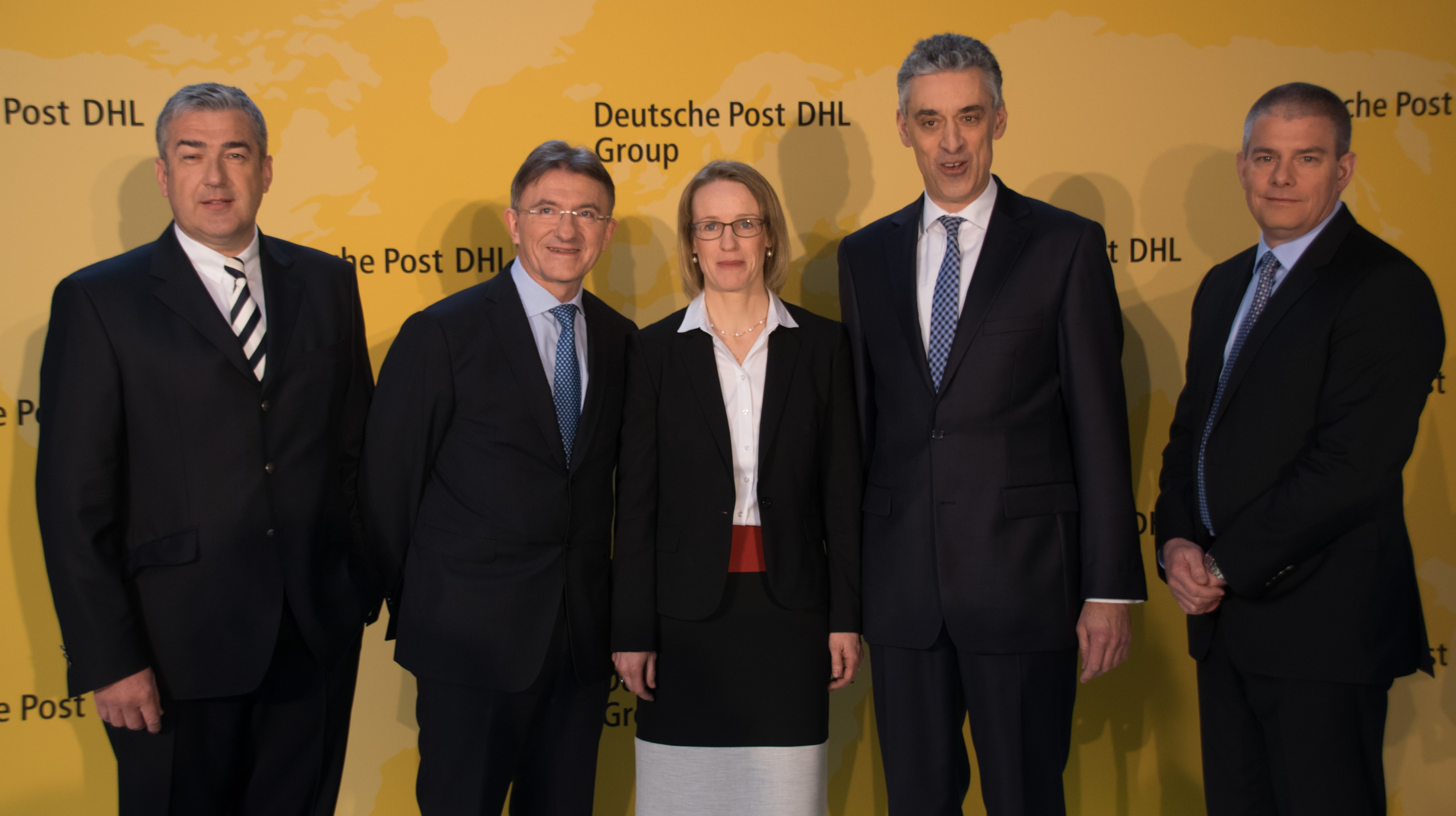 Vorstand Deutsche Post DHL Group: v.l.n.r.: Jürgen Gerdes, Ken Allen , Melanie Kreis, Frank Appel, John Gilbert